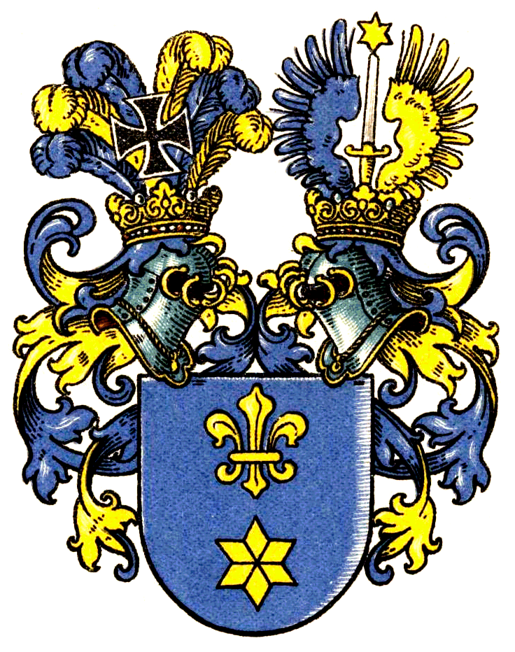 Wappen derer von Grolmann von 1871 Das Wappen von 1871 zeigt in Blau einen von einer goldene Lilie überhöhten goldenen Stern. Zwei Helme mit blau-goldenen Decken, auf dem rechten das eiserne Kreuz vor sechs abwechselnd blauen und goldenen Straußenfedern; auf dem linken ein aufgerichtetes goldbegrifftes blankes Schwert, über welchem ein goldener Stern schwebt, zwischen offenem, rechts blauen und links goldenen Flug.